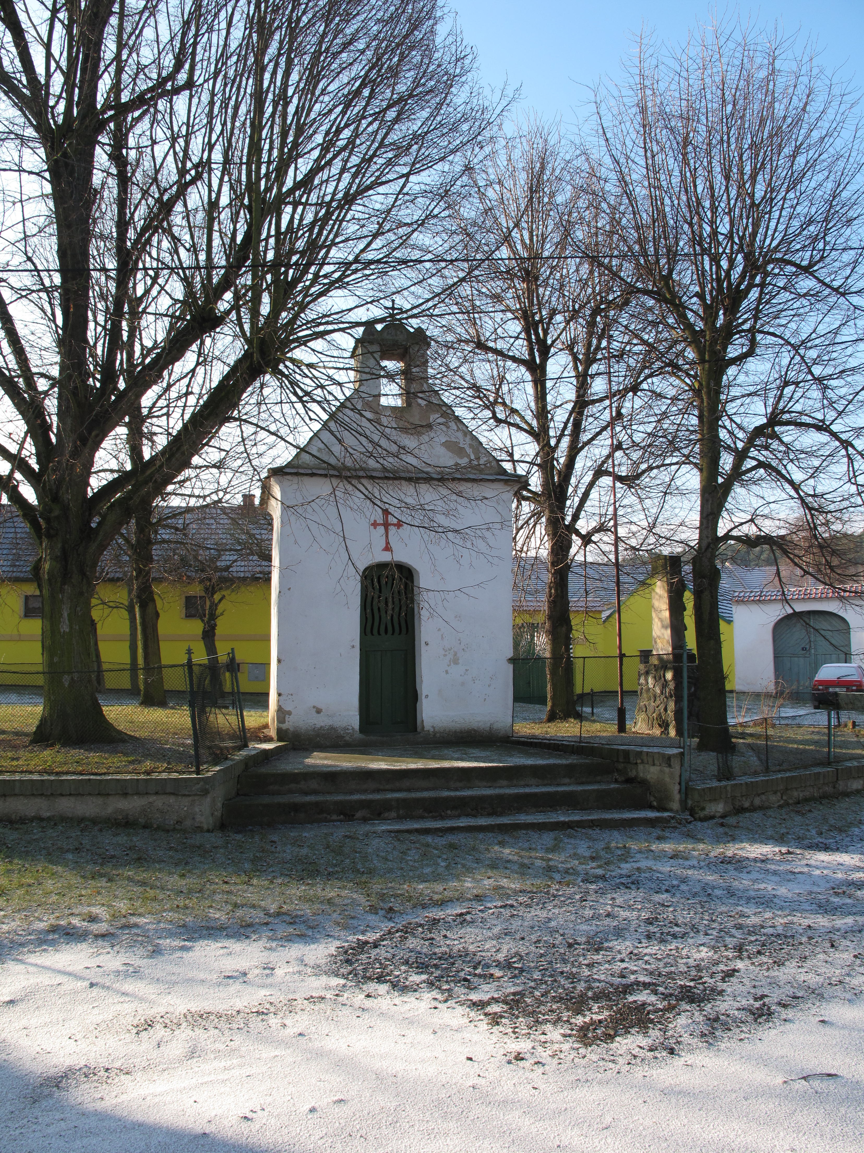 Kaplička v Přestavlcích. Okres Litoměřice, Česká republika.